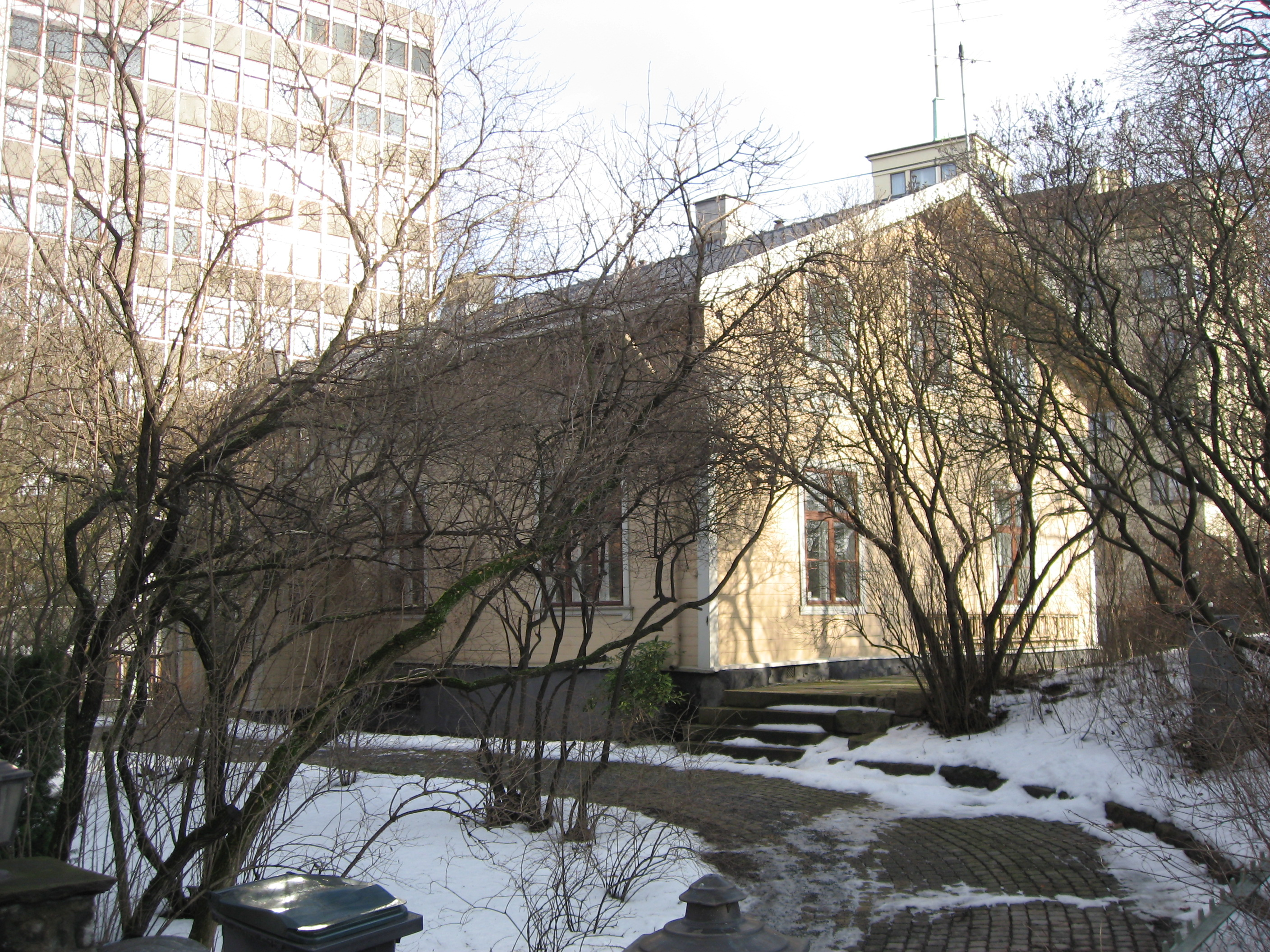 Wergelandsveien 2 in Oslo, Norway (Grotten) - Home of Henrik Wergeland